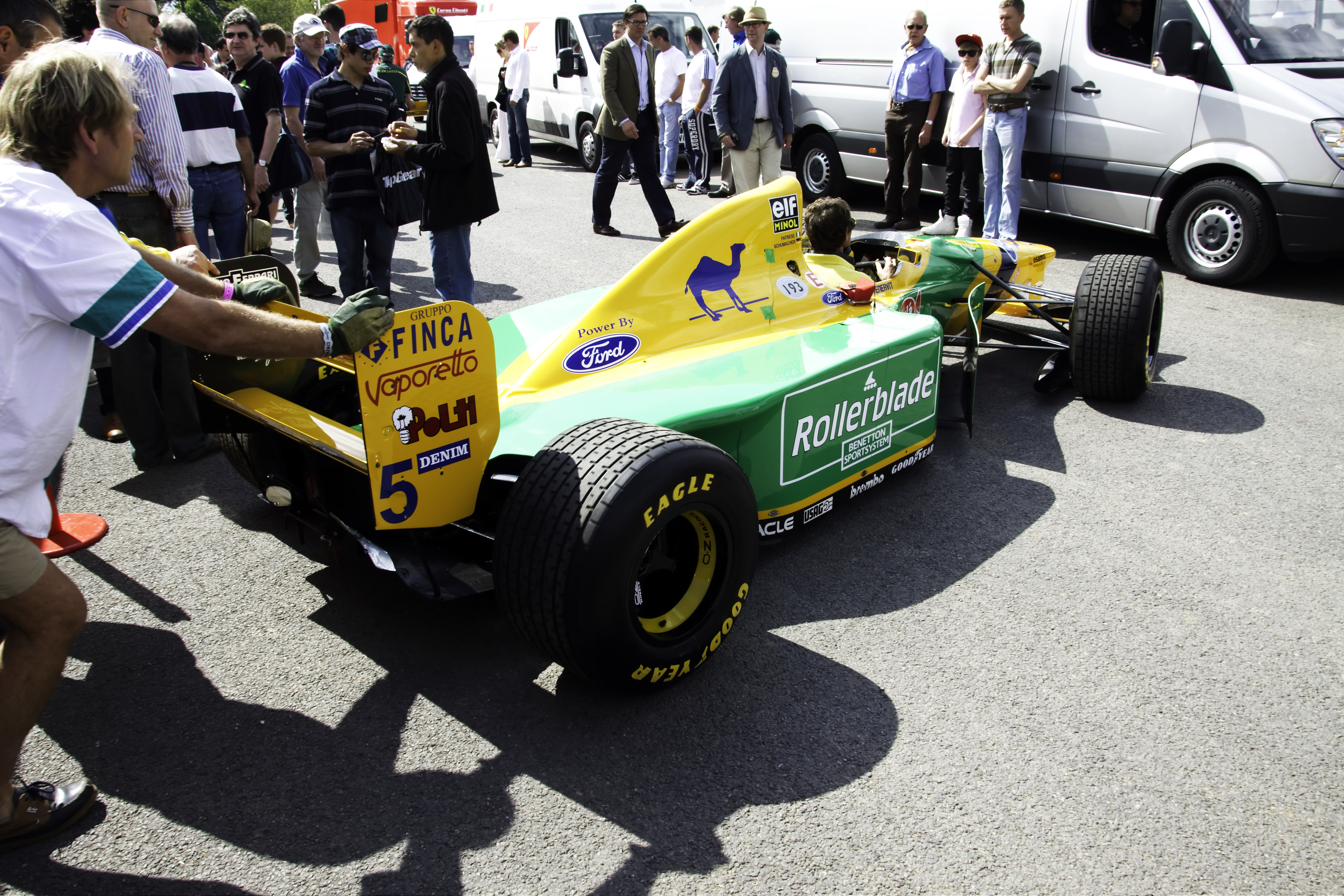 Benneton-Ford B193B